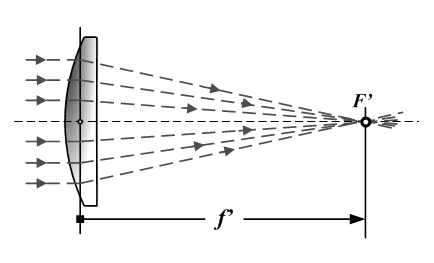 Gyűjtőlencse